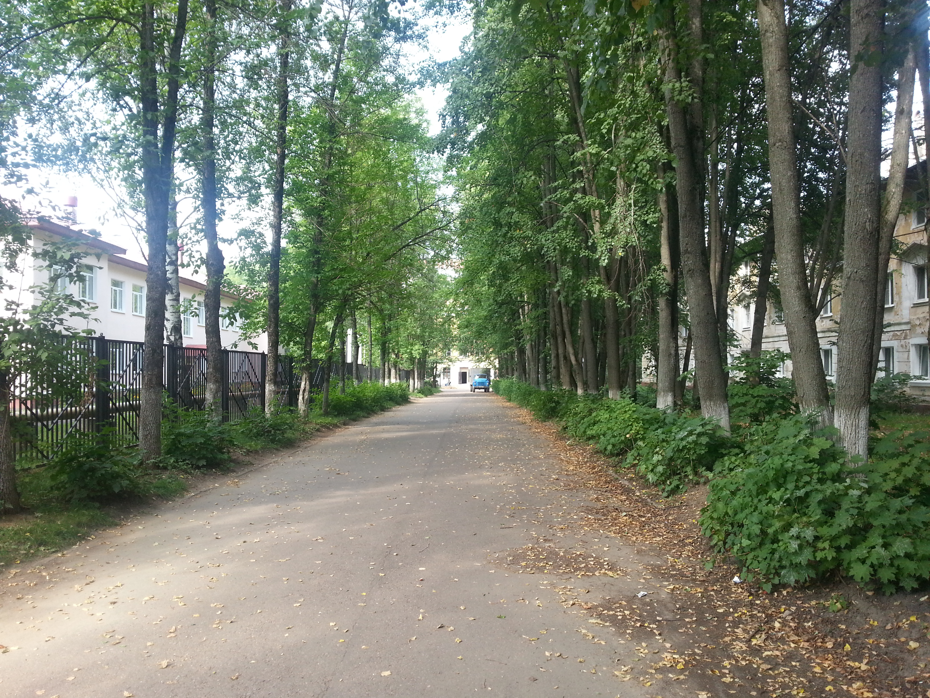 Улица Победы, поселок Ферма, г. Сергиев Посад